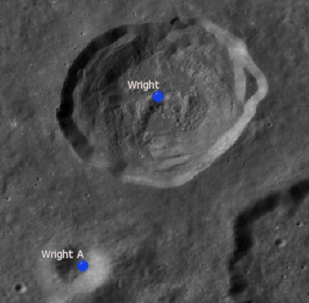 Cráter lunar Wright. Cráteres satélite. (Imagen LRO)